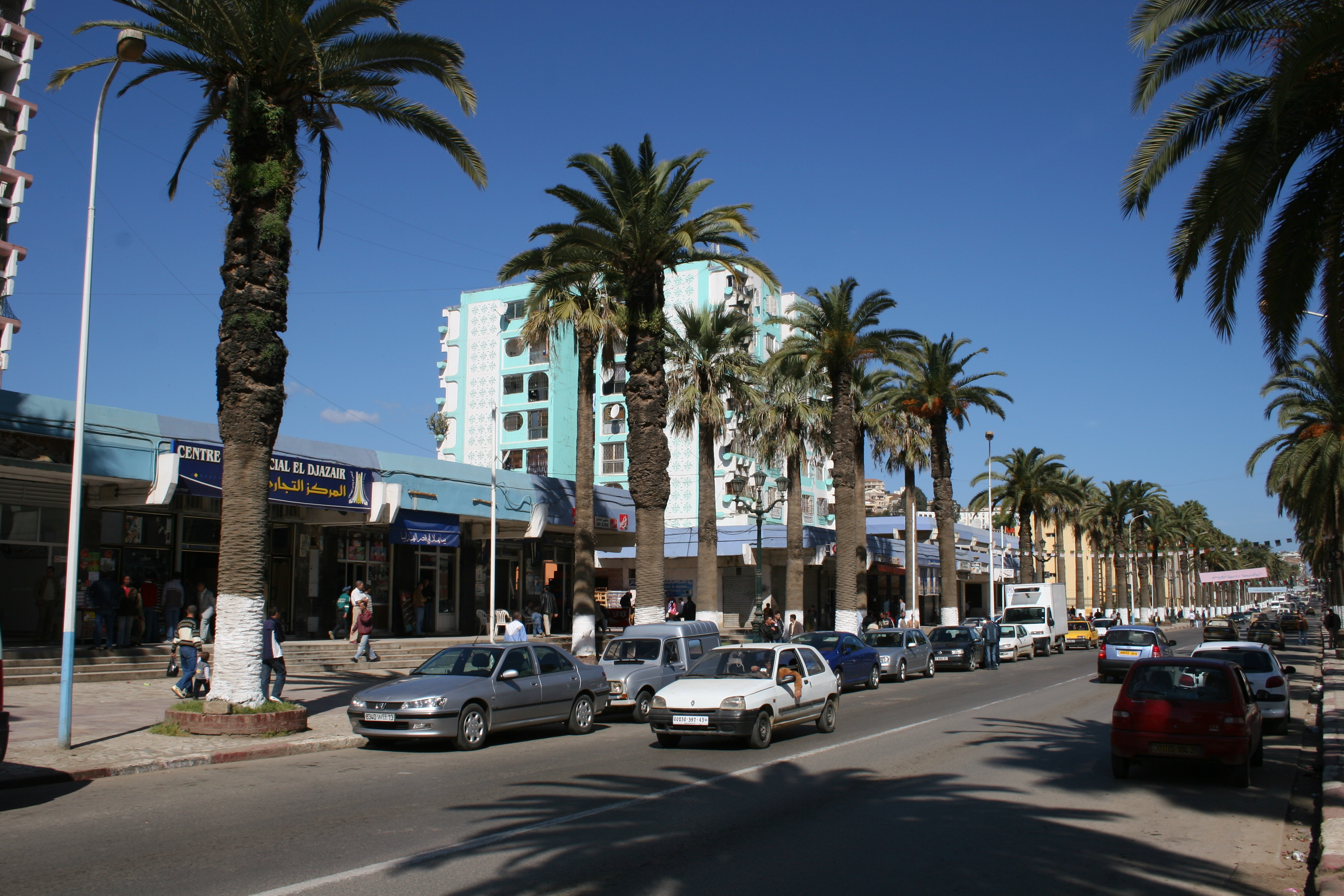 Strassenszene in Skikda